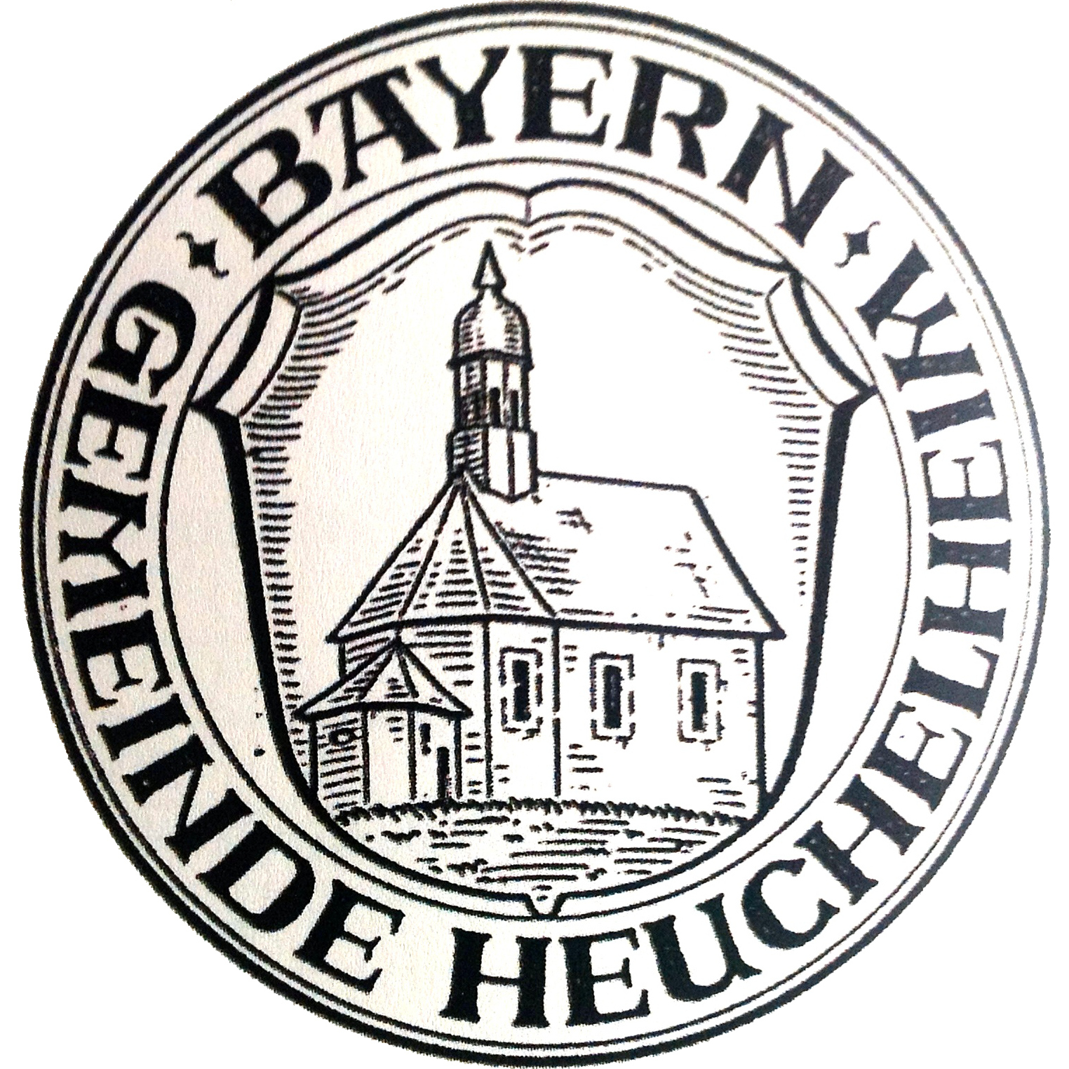 Dienstsiegel der ehemaligen Gemeinde Heuchelheim (Oberfranken), seit 1972 Ortsteil der Stadt Schlüsselfeld| im Landkreis Bamberg, Bayern, mit der Umschrift oben „Bayern“, unten „Gemeinde Heuchelheim“, und dem Gemeindewappen als Siegelbild